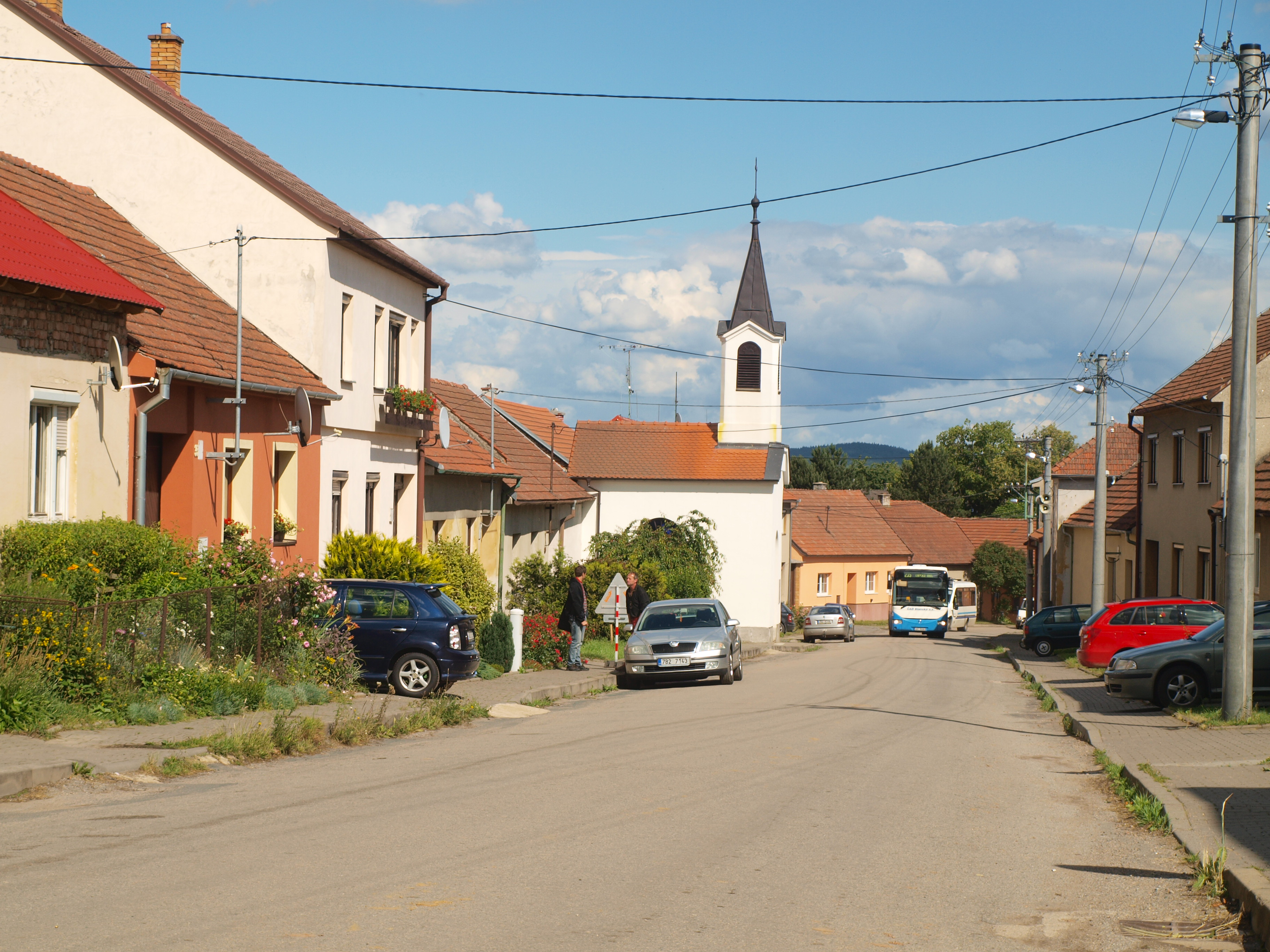 Kaple Nanebevzetí Panny Marie v místní části Brťov u Černé Hory v obci Brťov-Jeneč